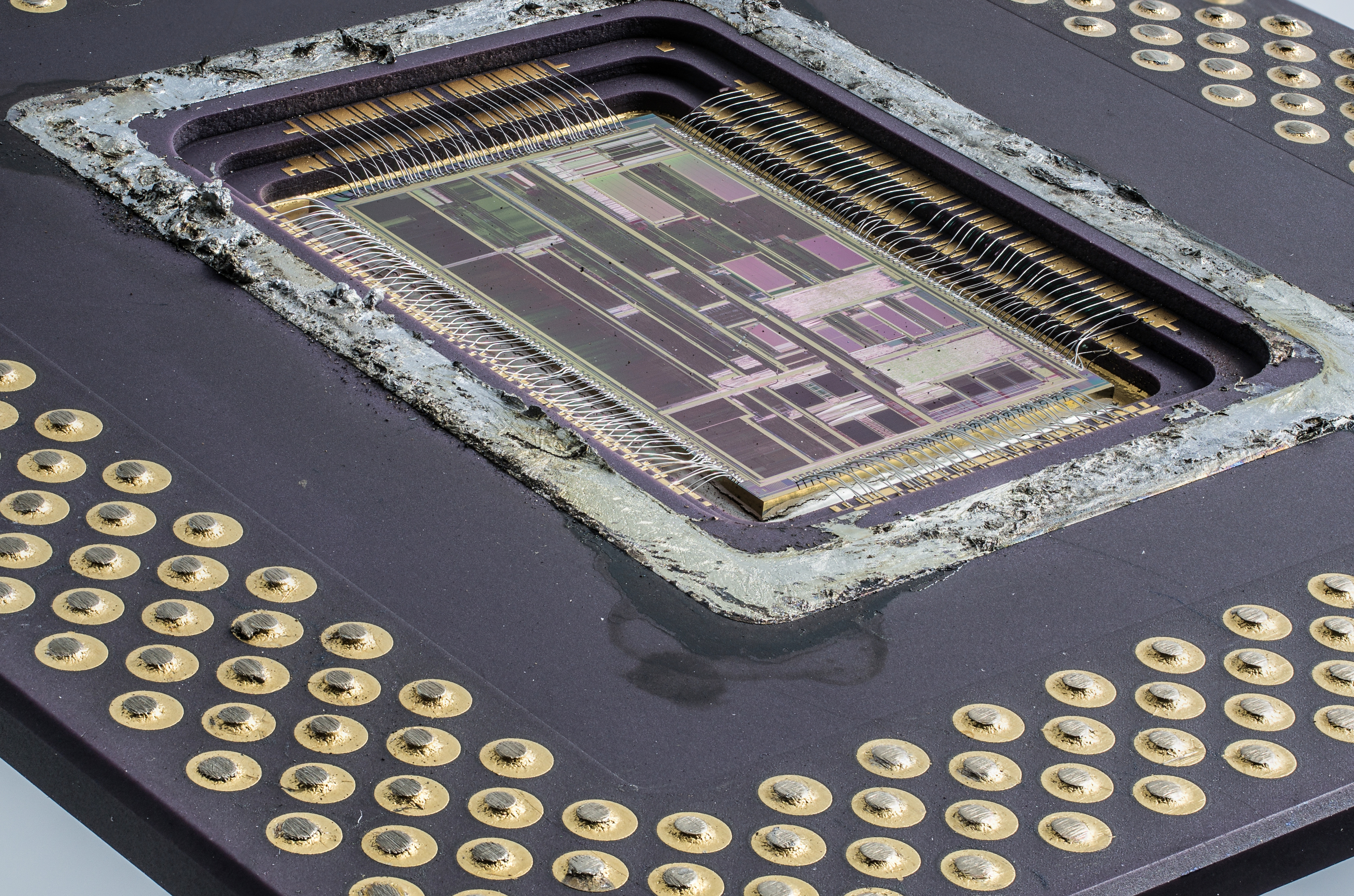 AMD-K5-PR133_2015-03-20-19.30.25_-_ZS-DMap_-_Stack-DSC03045-DSC03417